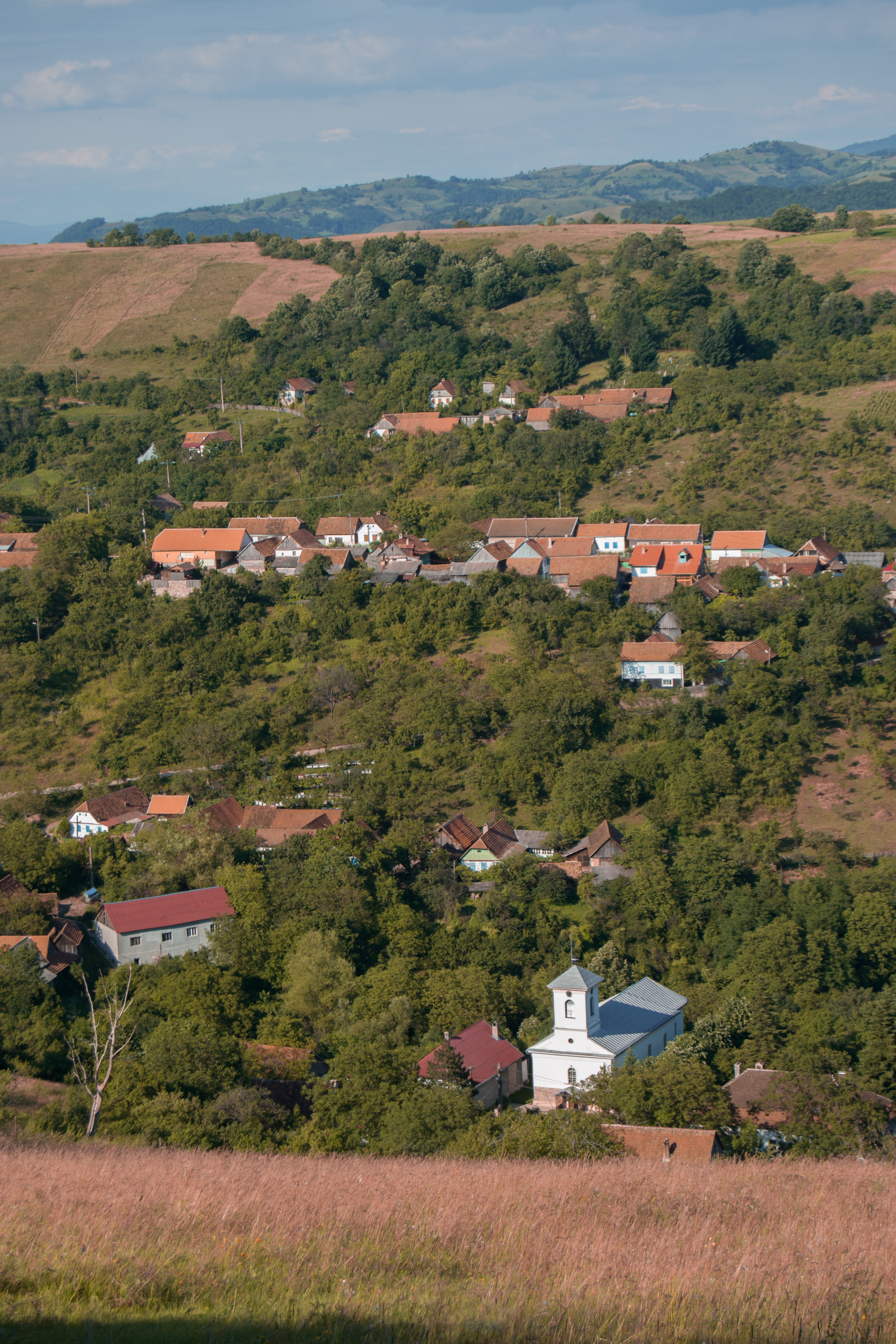 Vesnice v Rumunsku